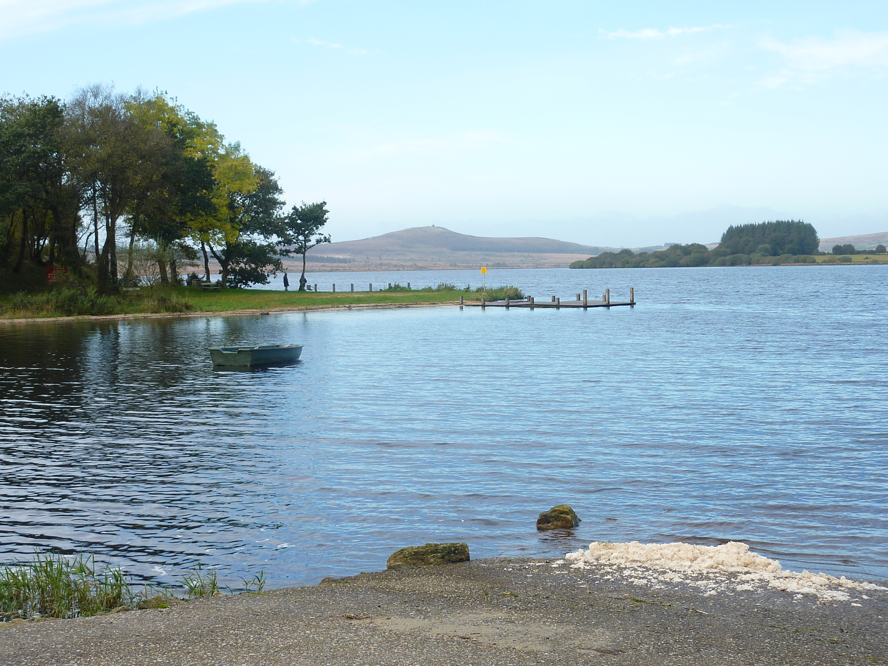 Le réservoir Saint-Michel (lac de Brennilis) et le Mont-Saint-Michel de Brasparts vus depuis les rives du lac à Brennilis